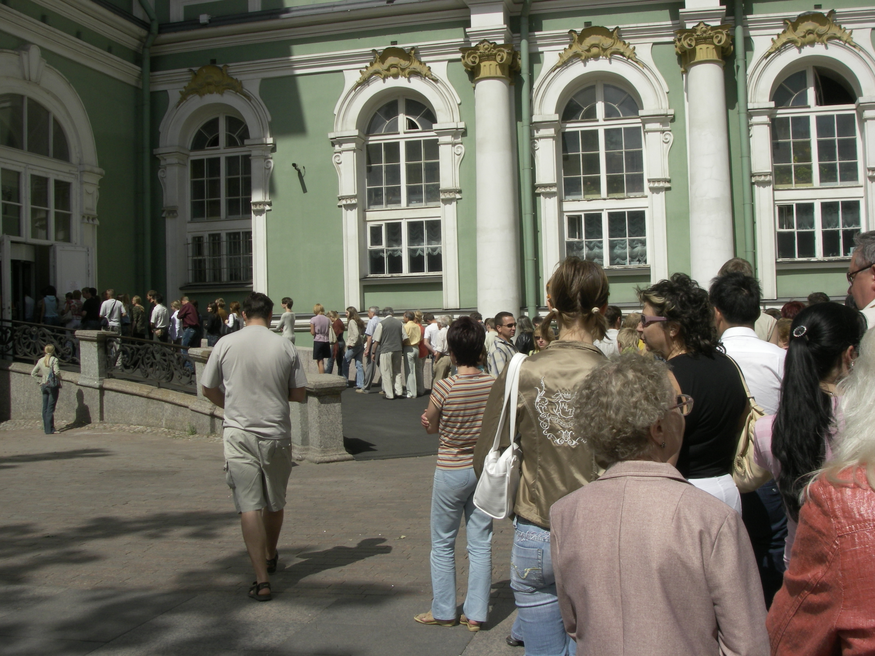 Очередь посетителей в Зимний дворец.